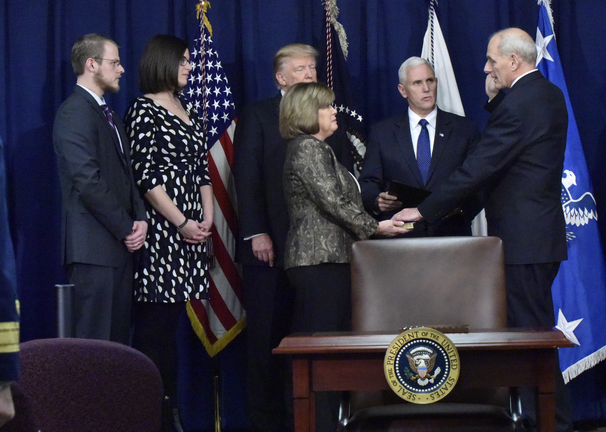 POTUS visits DHS